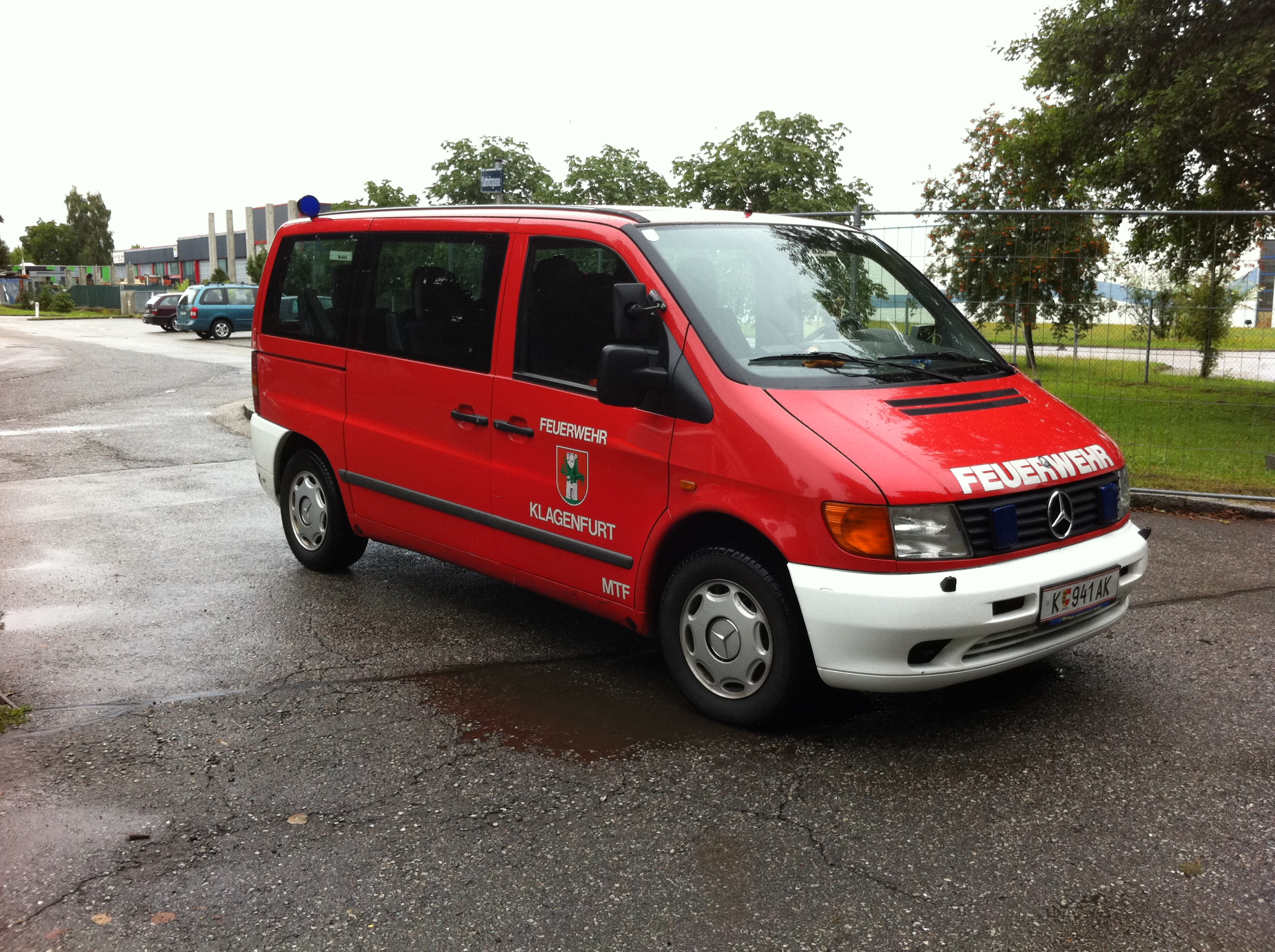 MTF der Feuerwehren der Stadt Klagenfurt